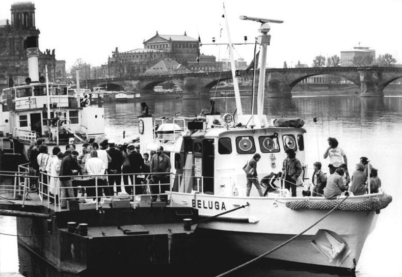 Dresden, Forschungsschiff ADN-Hiekel 18.4.1990 Dresden: Greenpeace-Die "Beluga", mit der die internationale Umweltschutzorganisation die Verschmutzung der Elbe durch DDR-Betriebe untersucht hatte, machte am Terrassenufer Station. Über erste Ergebnisse informierte die Besatzung des Laborschiffes auf einer Pressekonferenz. So zählt das Zellstoffwerk Pirna, das täglich fünf bis zehn Tonnen besonders giftige organische Chlorverbindungen einleitet, zu den Hauptverschmutzern. Greenpeace will mit dieser Aktion zugleich nachweisen, daß nicht nur DDR-Betriebe, sondern auch BRD-Firmen an der Elbe-Verschmutzung beteiligt sind.